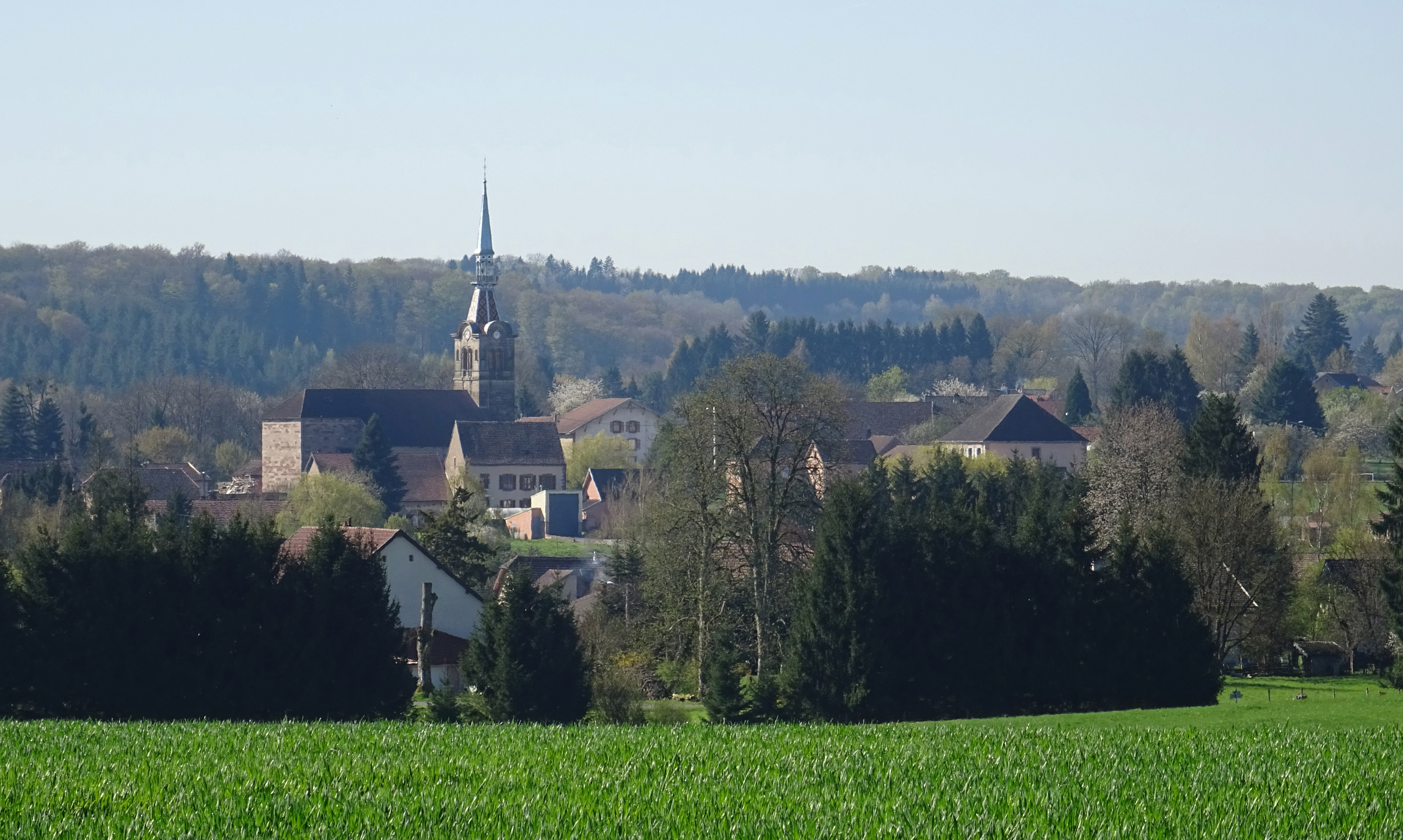 Le village de Moffans vu à travers les champs.